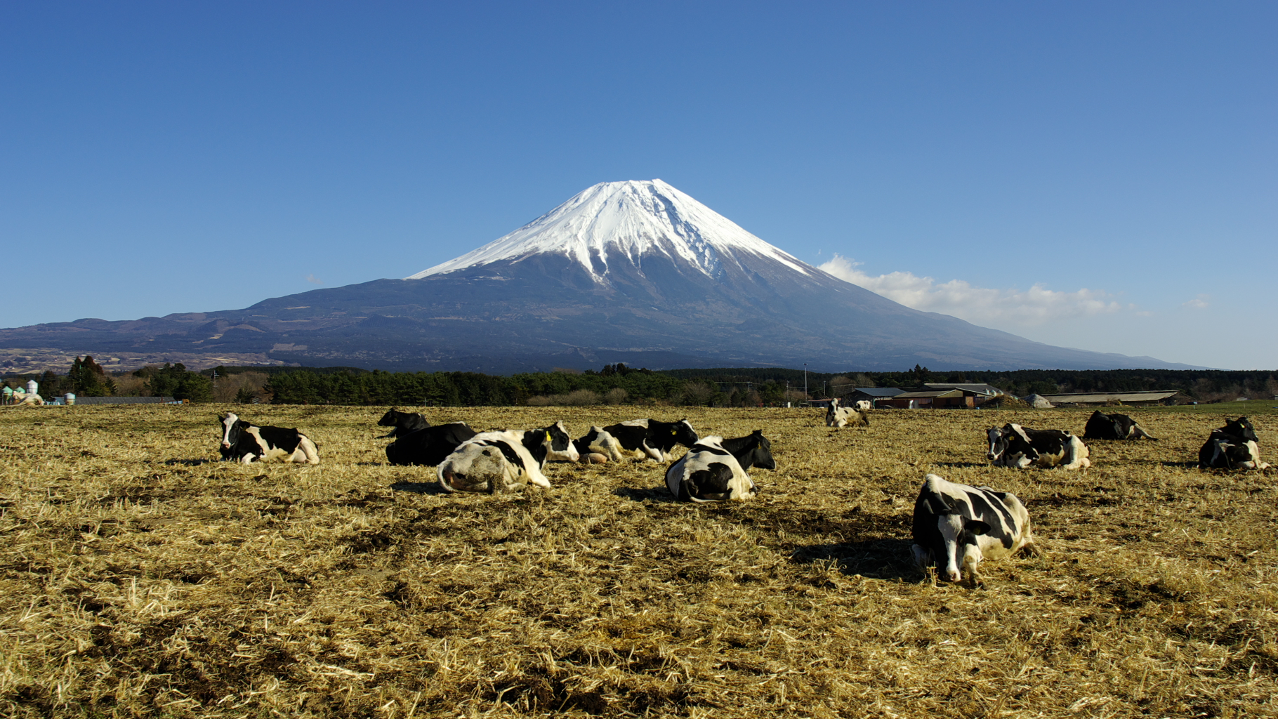 富士山と富士宮市朝霧高原の牧場。16:9にトリミング。